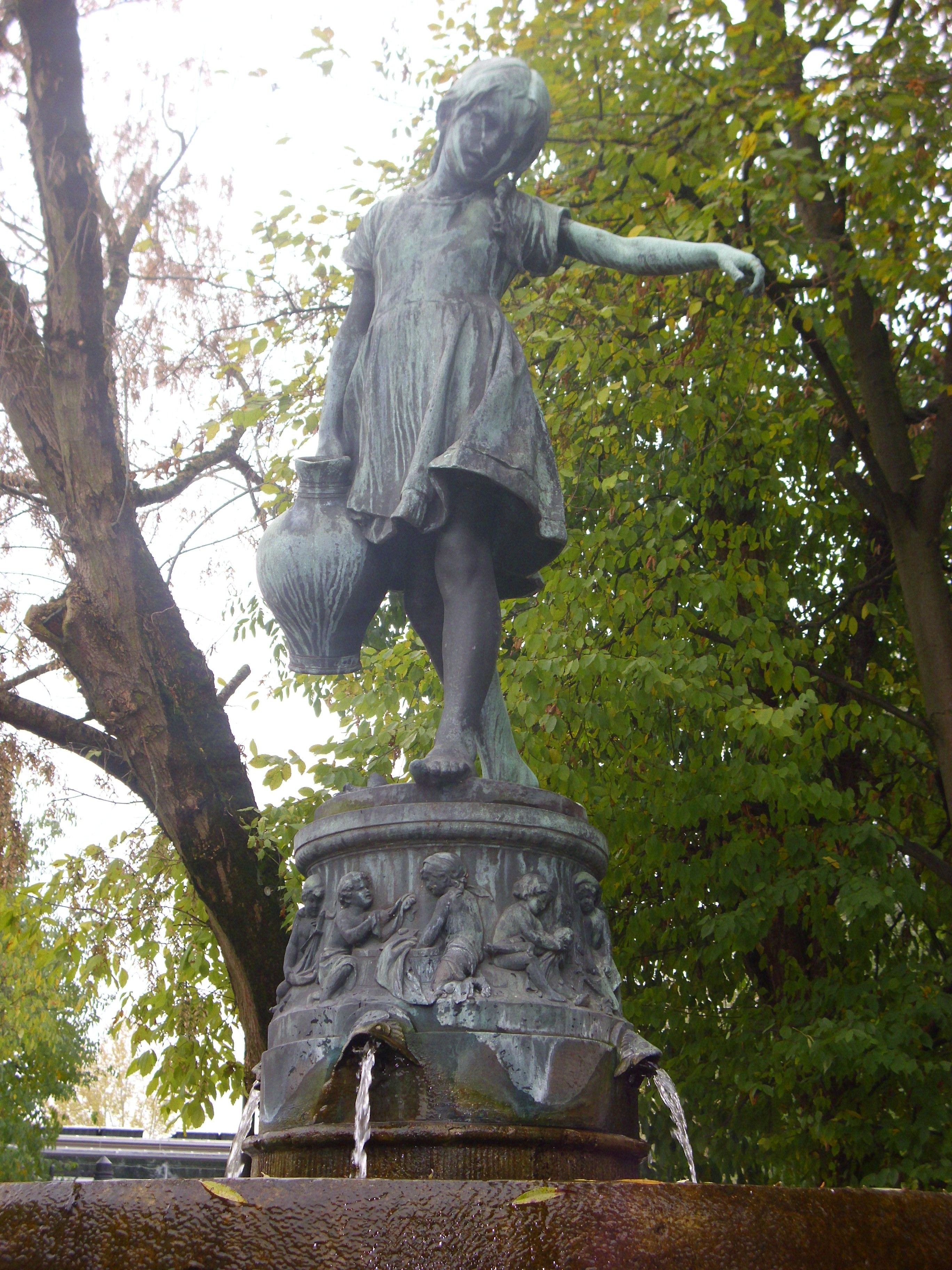 Jugendstilbrunnen aus dem Jahr 1909 von Prof. Johann Rössner zur Erinnerung an Sebald Städtler (* 1689 in Roth)